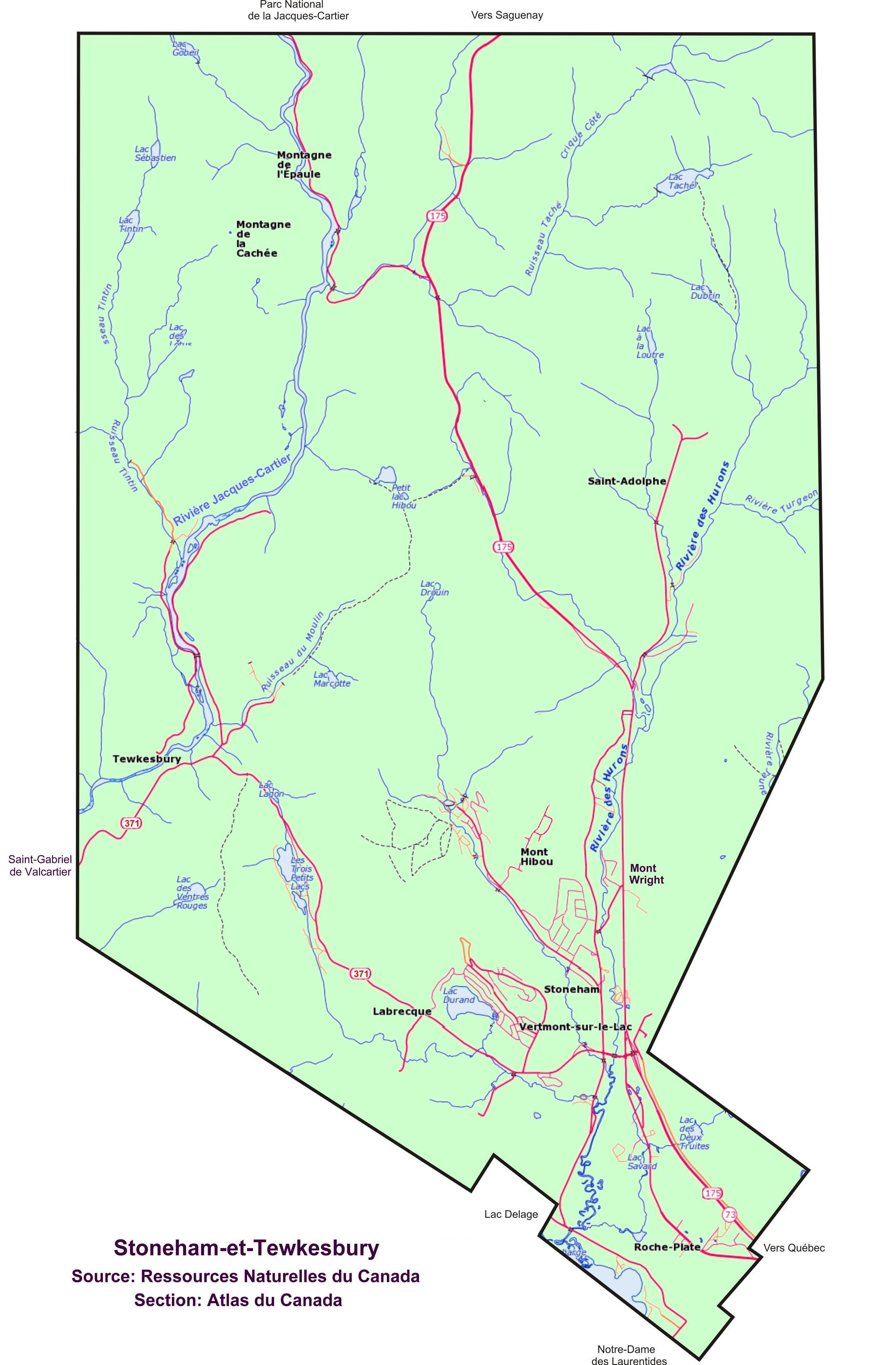 Carte de Stoneham Qc Canada